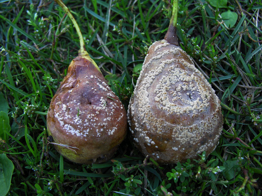 Sodinė monilija (Monilia fructigena) Foto: Algirdas, 2006 m. rugpjūčio 24 d., Lietuva